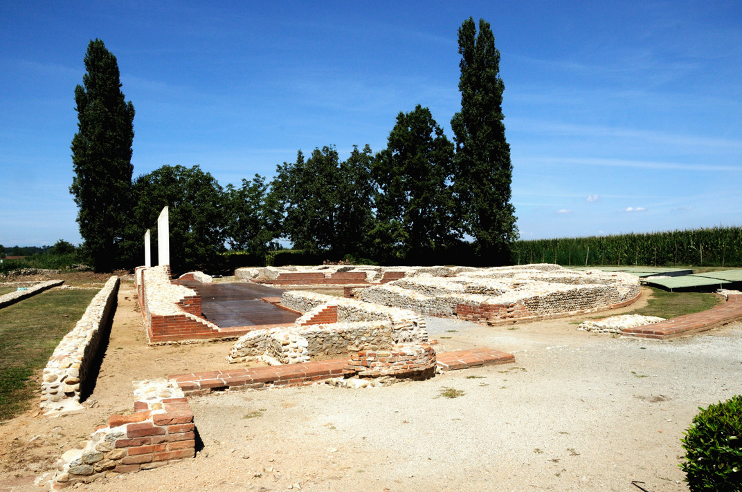 Teatro romano Bene Vagienna, Italy